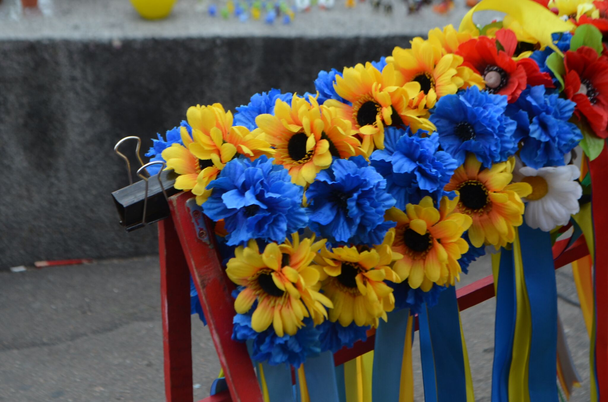 Композиція "Магічні квіткові віночки" на Київській міській виставці квітів